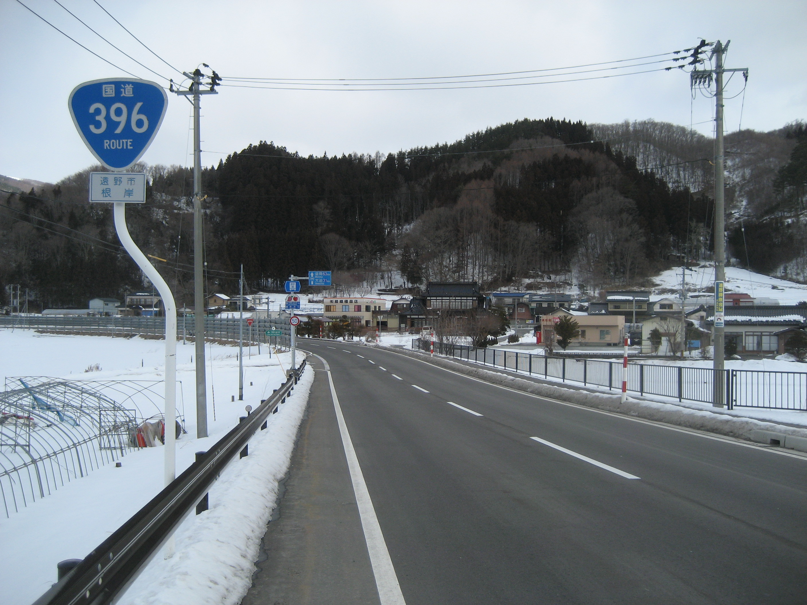 国道396号線岩手県遠野市根岸付近